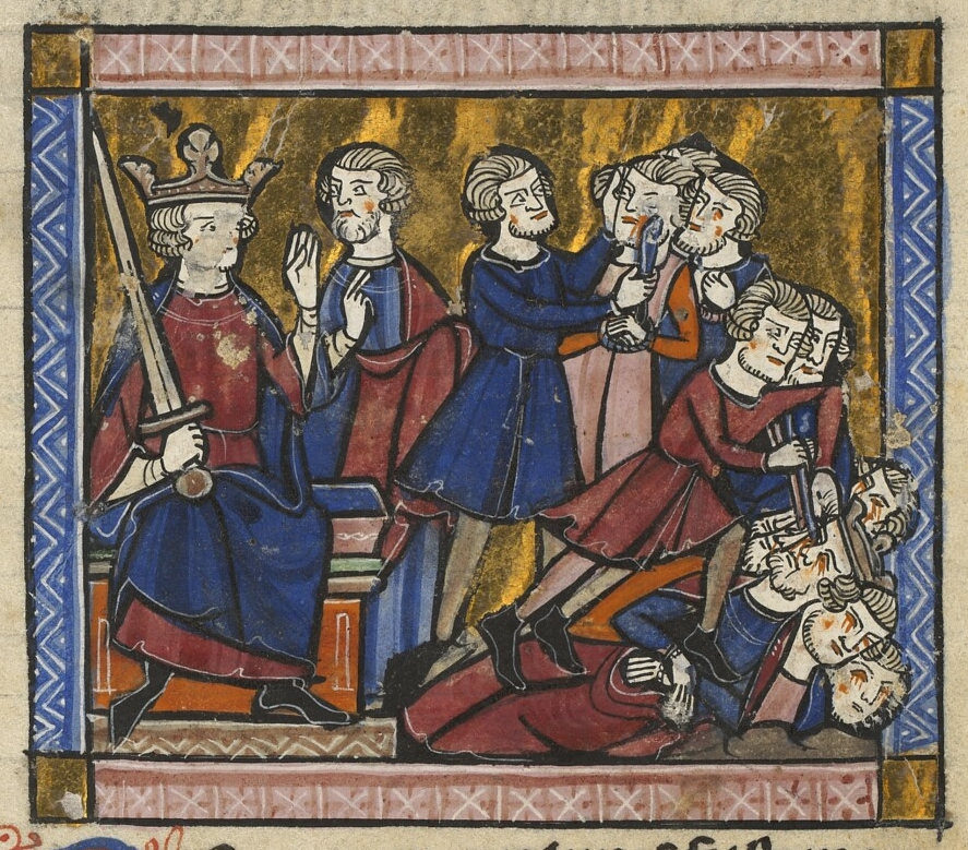 Supplice d'Alexis Comnène